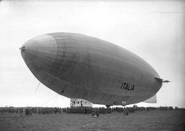 Die glückliche Landung des Nordpol-Luftschiffes "Italia" in Stolp in Pommern! Nach 30 stündigem Fluge landete das italienische Nordpolluftschiff "Italia" unter Führung des Generals [Umberto] Nobile wohlbehalten in Stolp in Pommern. Eine Stabilisierungsfläche am Luftschiff wurde im Gewittersturm stark beschädigt. Das glücklich gelandete Luftschiff "Italia" in Stolp i/Pommern.